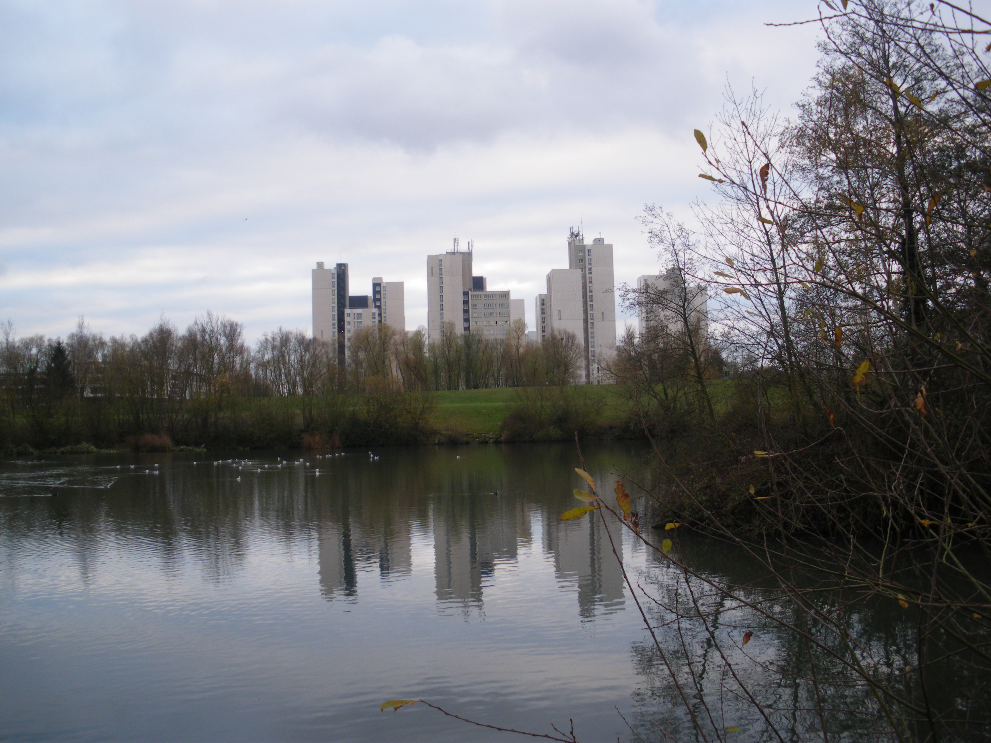 Les Ulis, vue du Parc Nord, France